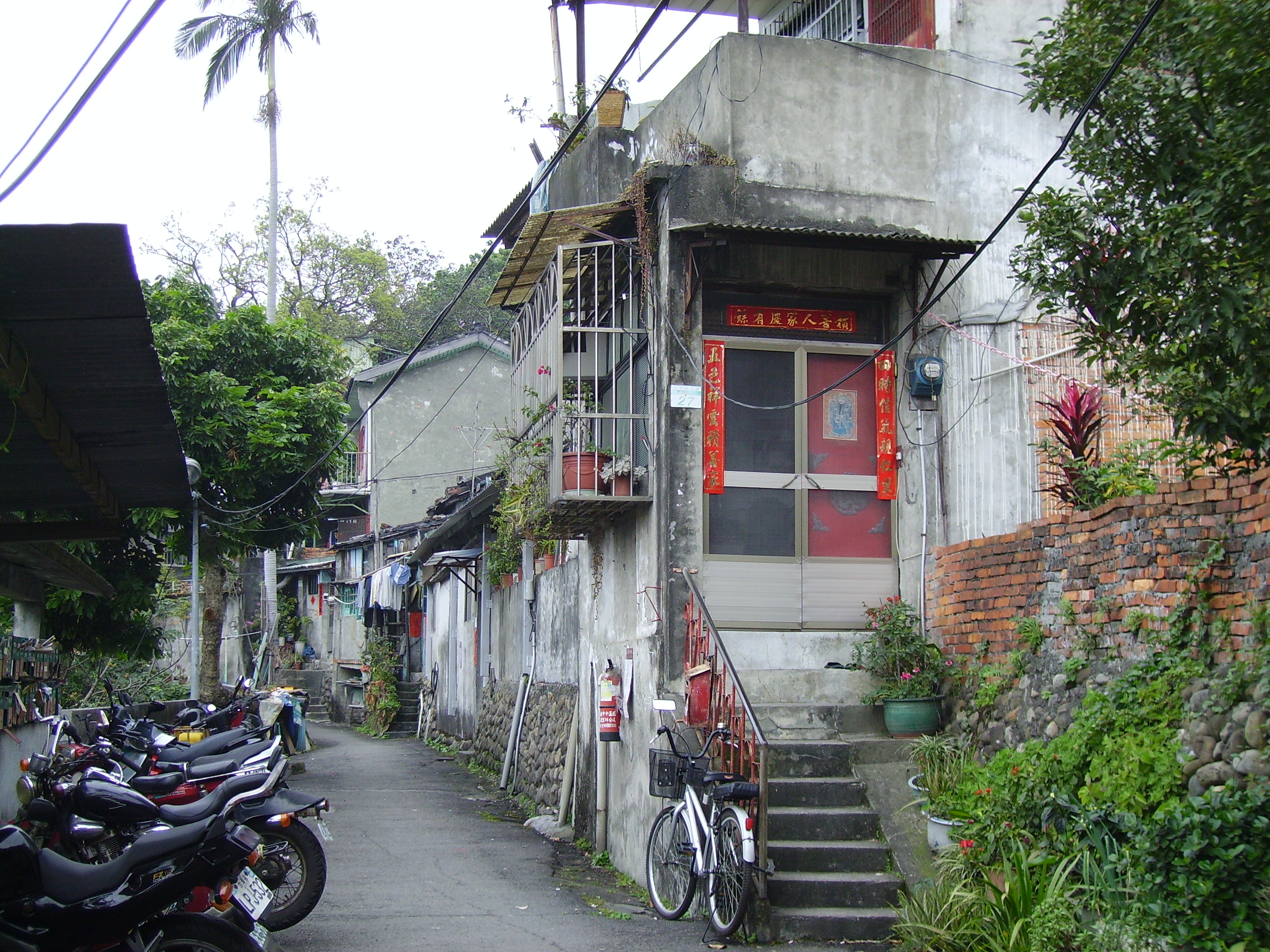 臺北市寶藏巖。